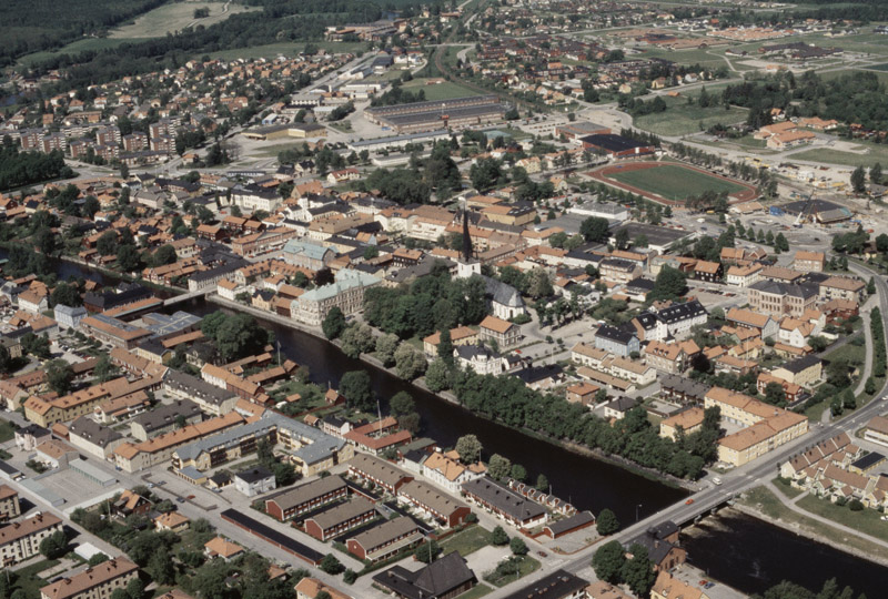 Arboga stad. Bilden är tagen mot (väderstreck): NV Motiv: Arboga Nyckelord: Flygbilder, Riksintressen Kategori: Stadsmiljö Arboga stad. Bilden är tagen mot (väderstreck): NV.